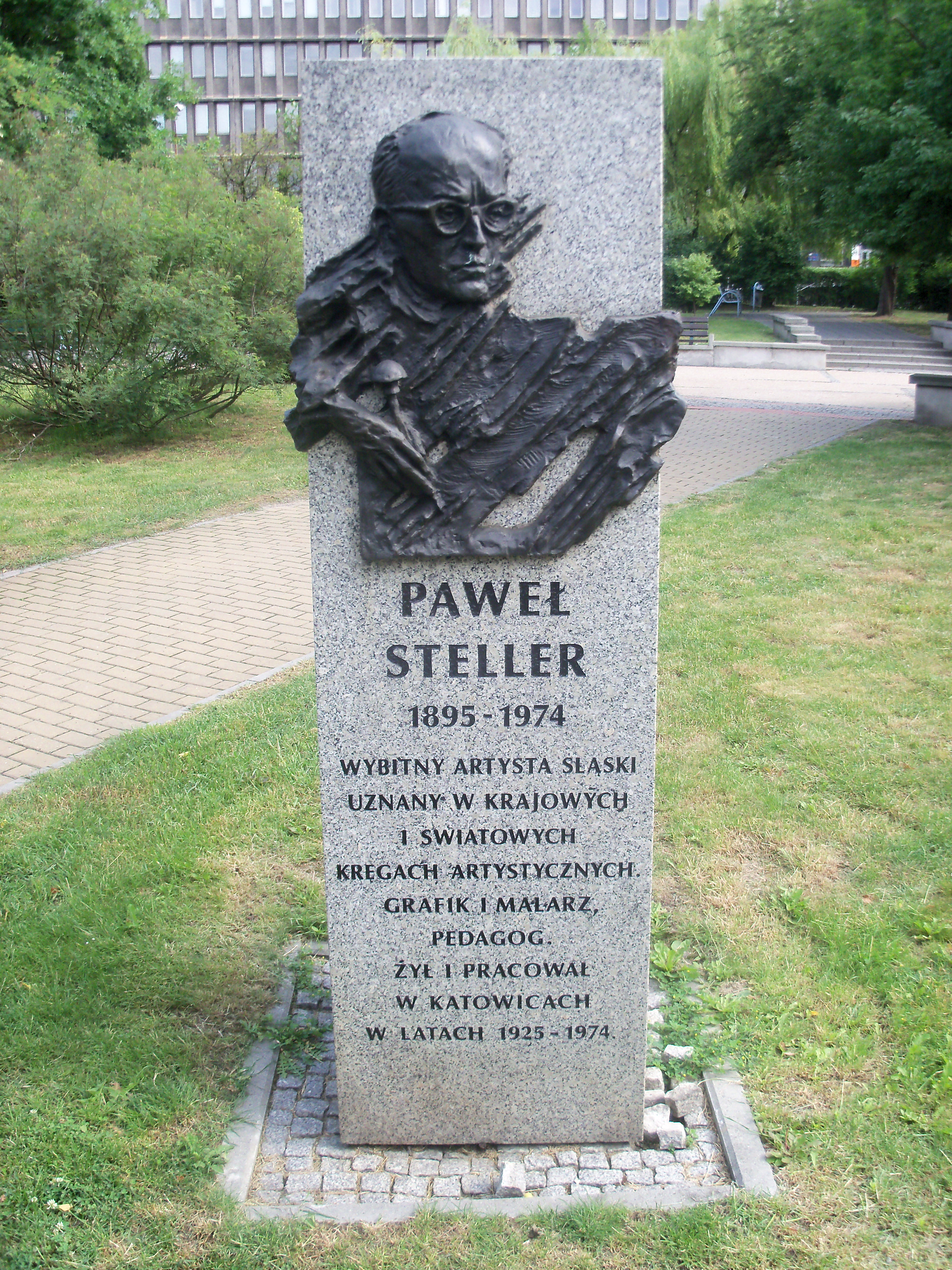 Galeria Artystyczna na placu Grunwaldzkim w Katowicach: Rzeźba przedstawiająca Pawła Stellera